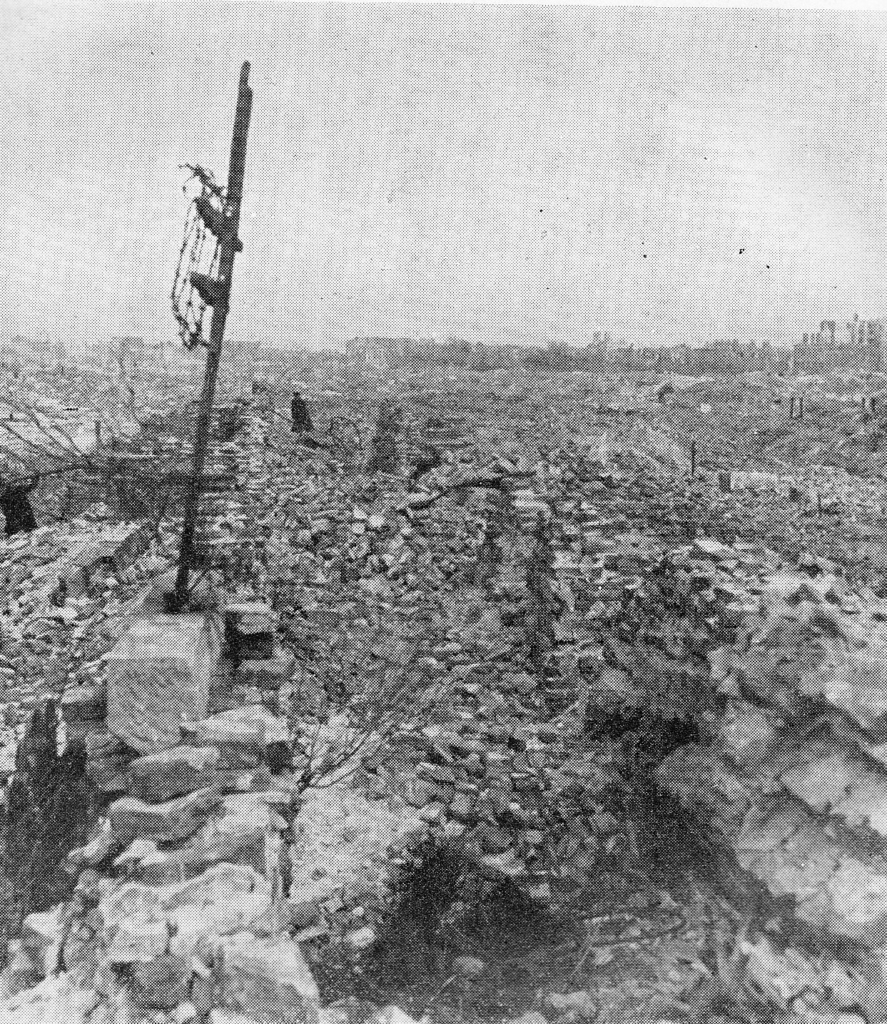 Ruiny więzienia Pawiak po wojnie i otaczające go ruiny dawnego getta